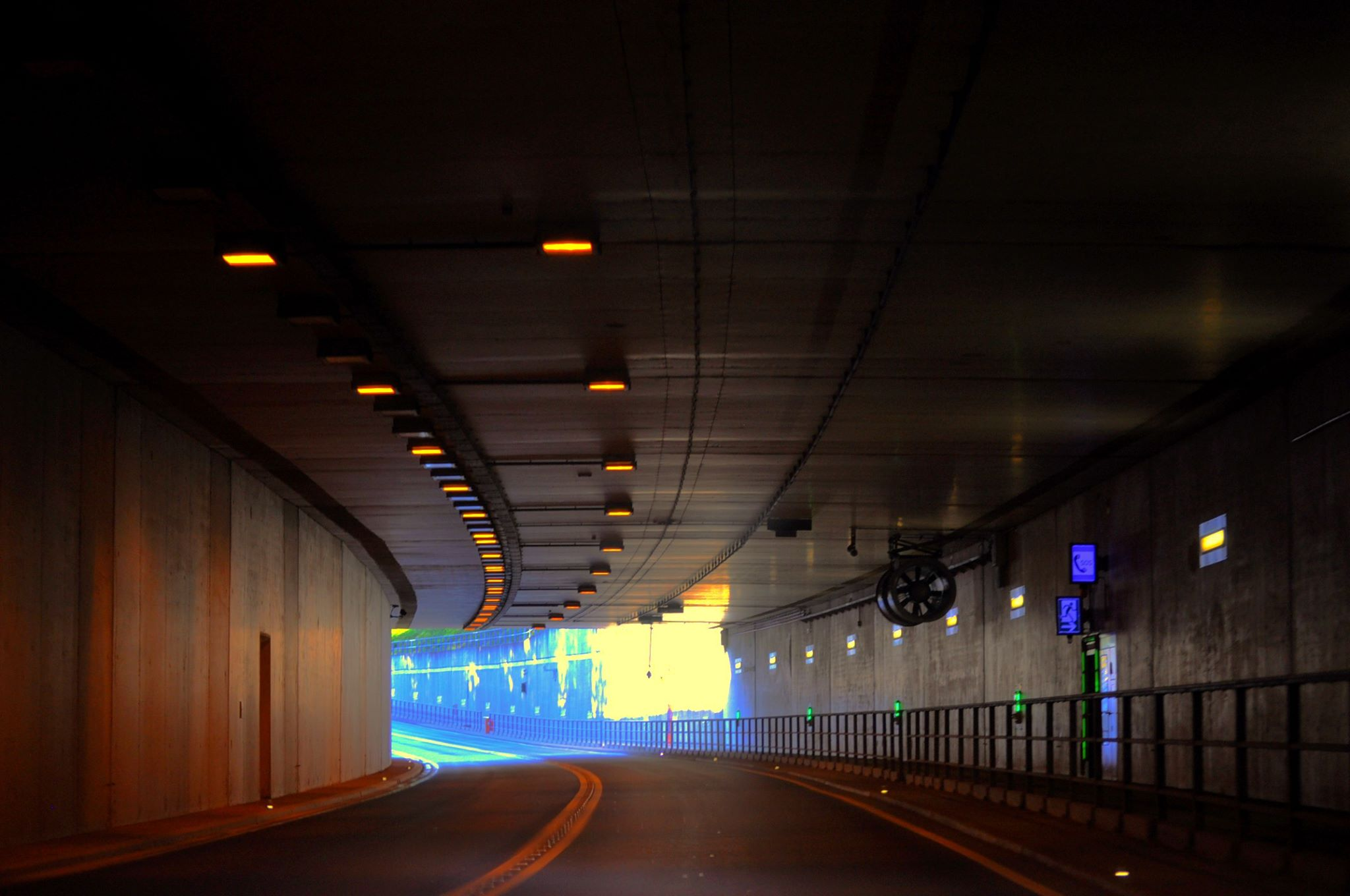 Mönchwaldtunnel Ausfahrt Nord